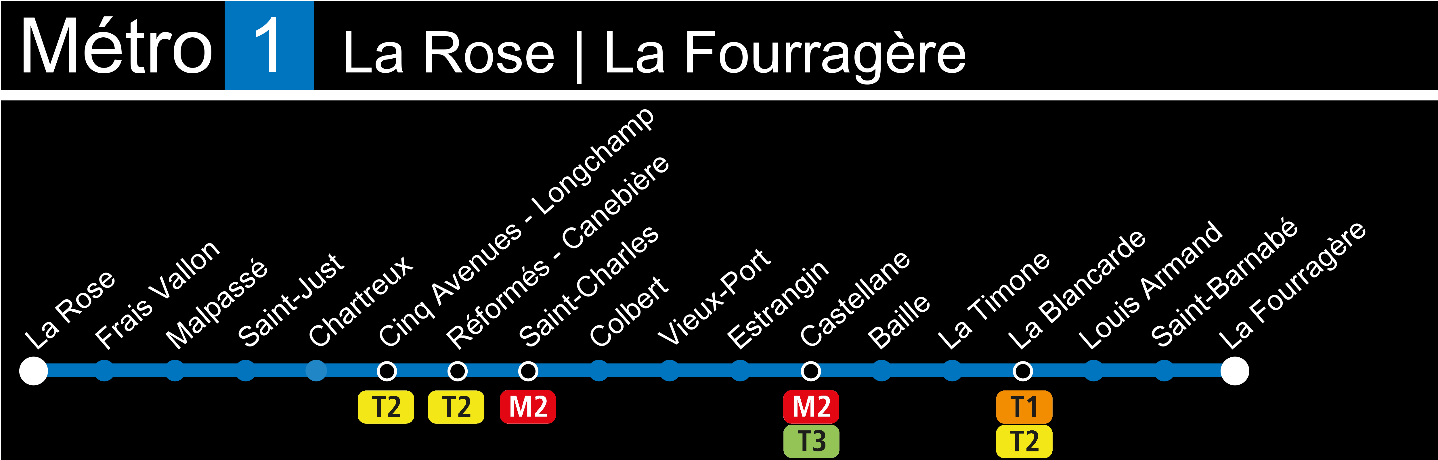 Réalisation de l'affichage des stations de la ligne affiché en stations